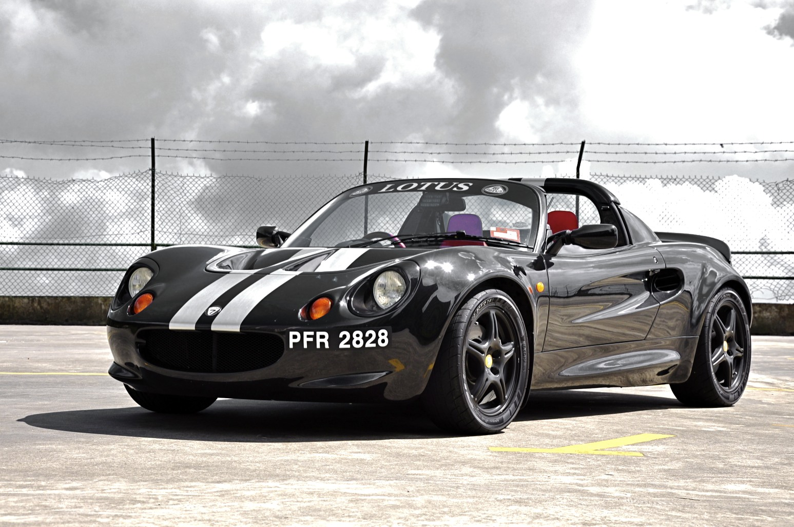 Lotus Elise S1.